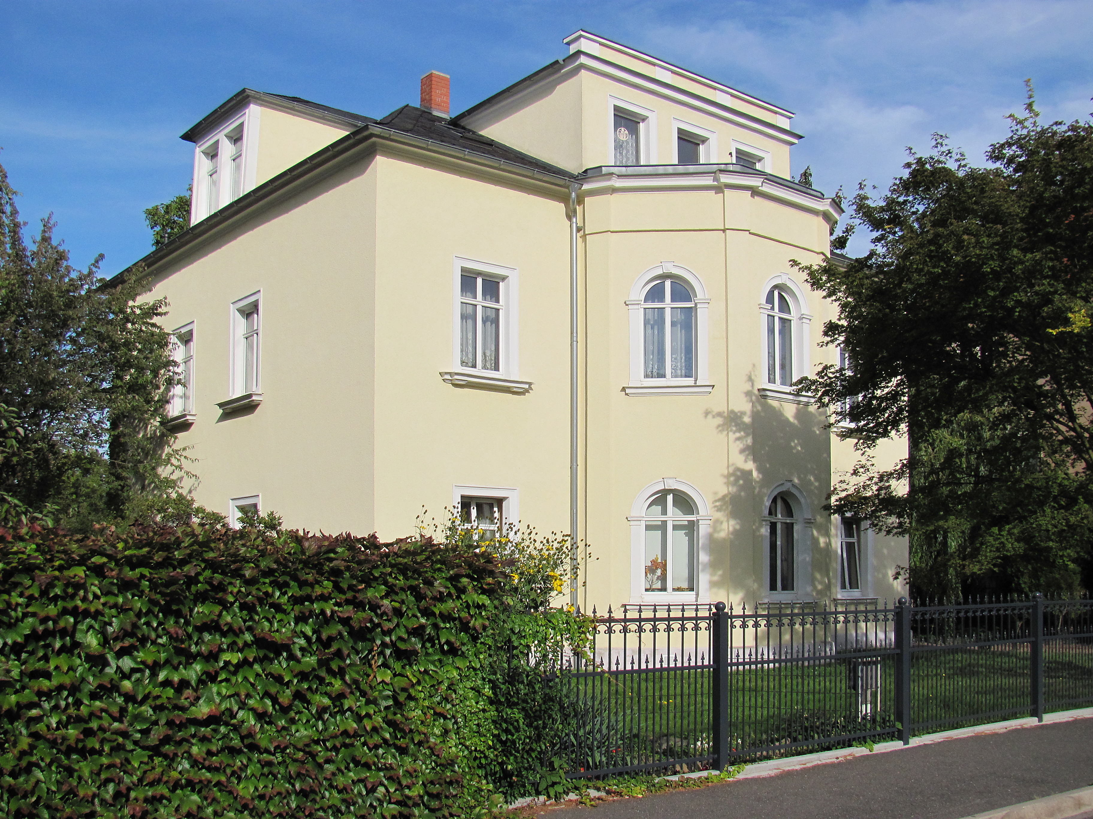 Radebeul-Kötzschenbroda, Louise Roths Villa in der Harmoniestraße 5